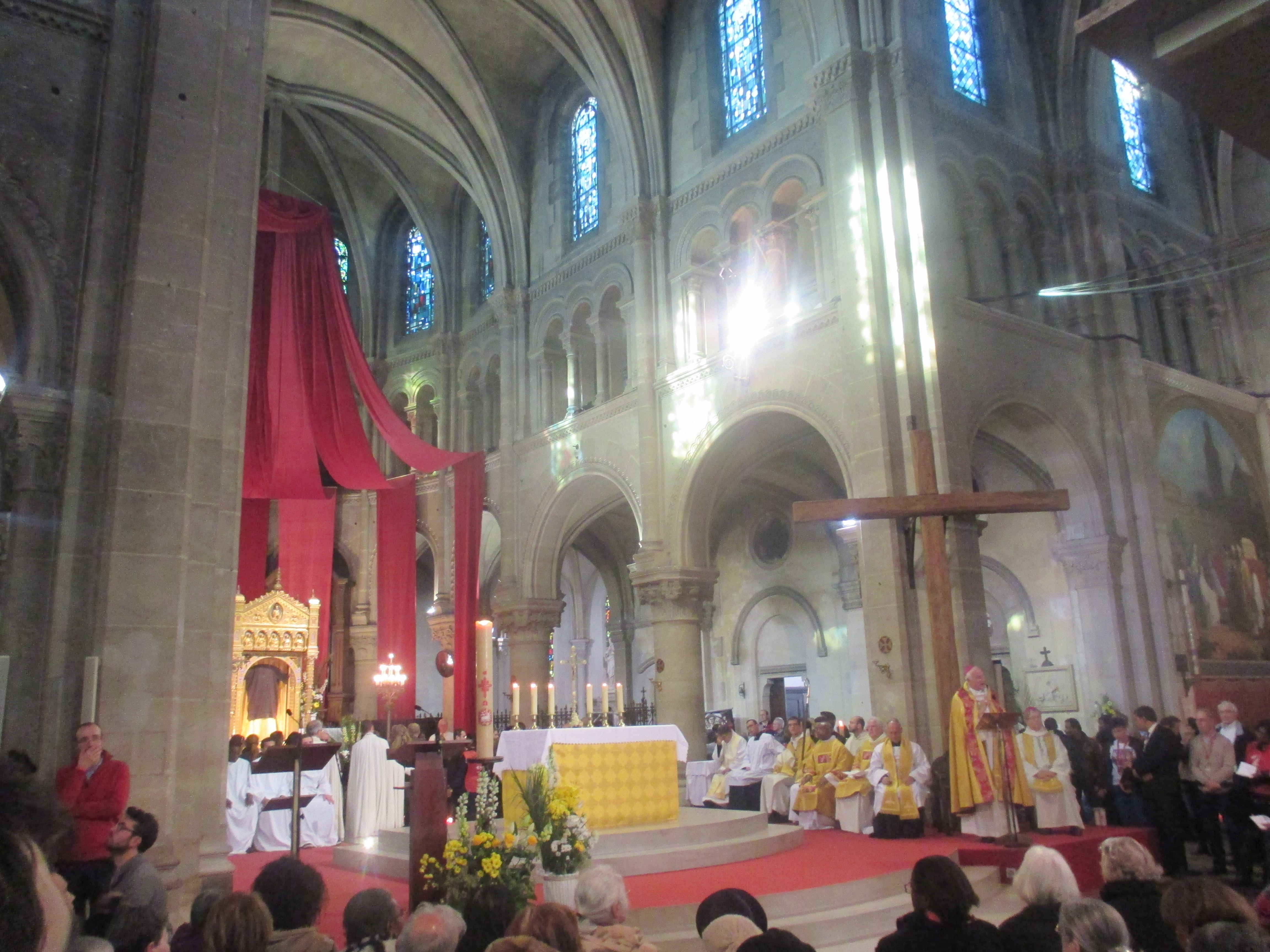 Vêpres du dernier jour de l'ostension de la Sainte Tunique (à gauche), le 10 avril 2016 avec Mgr Lalanne.